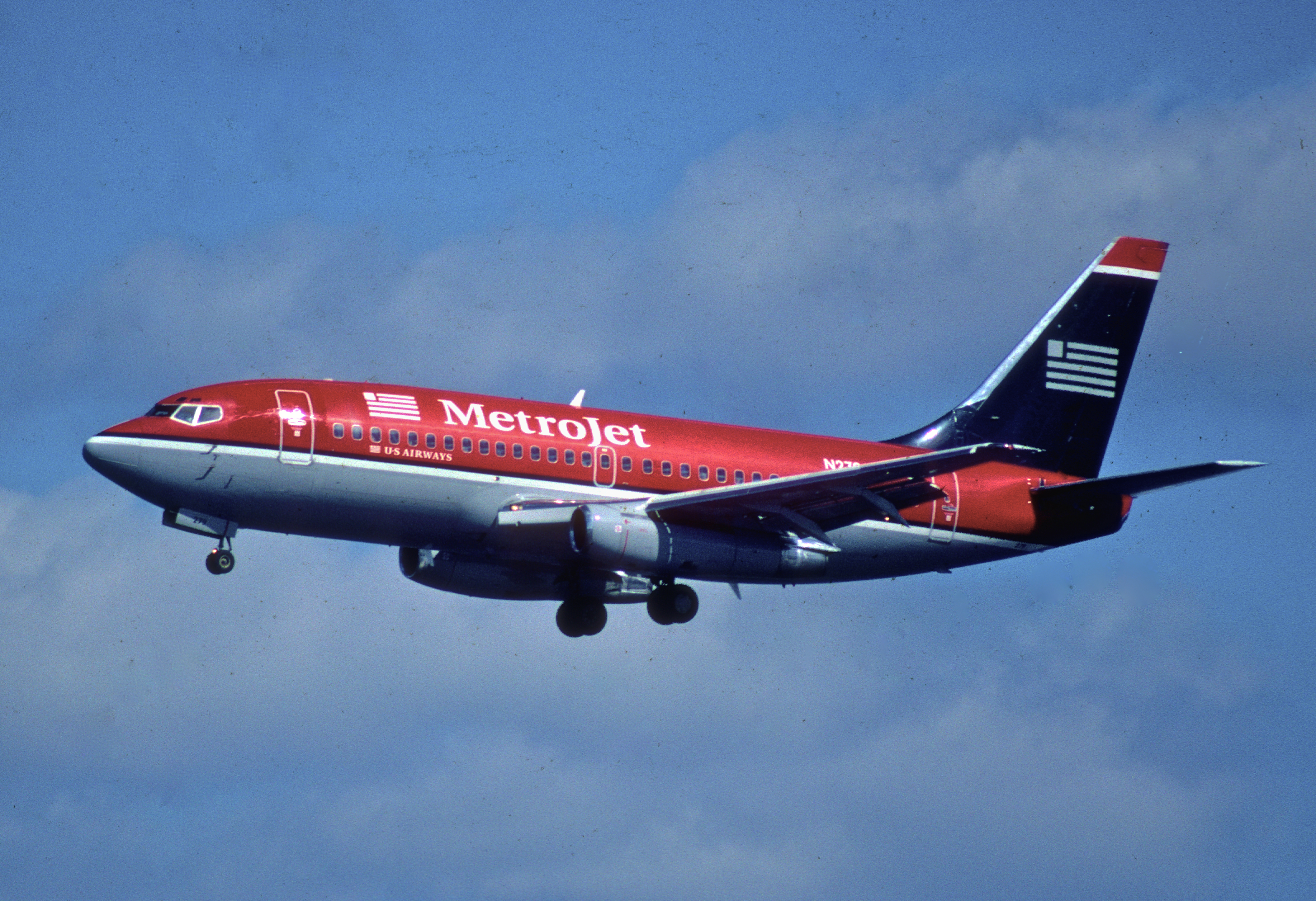 125as - Metrojet Boeing 737-2B7; N279AU@LGA;18.03.2001